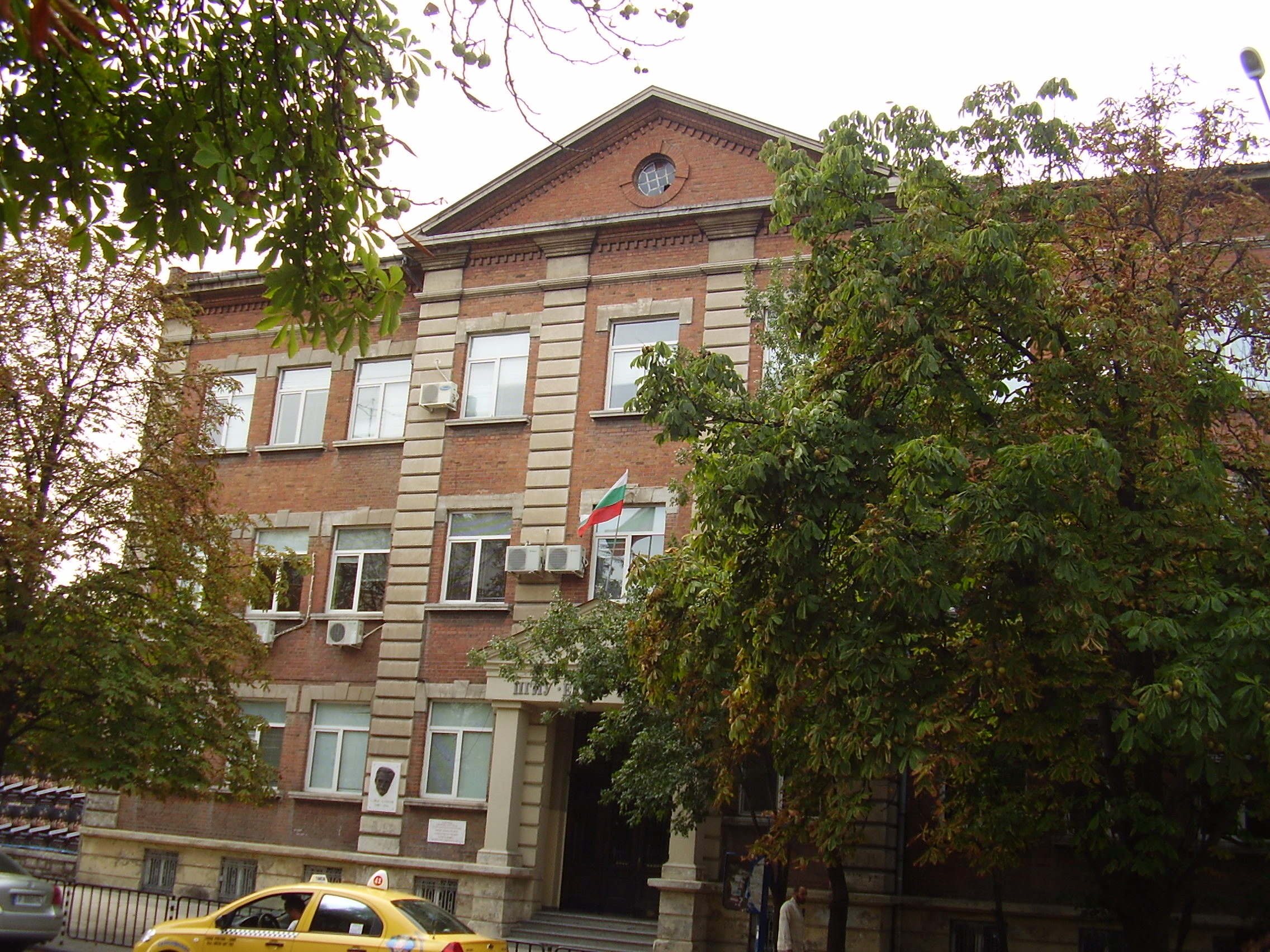 Secondary school of economics and management "Elias Canetti" - Ruse